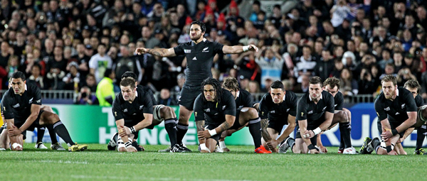 COUPE DU MONDE DE RUGBY 2011 NOUVELLE ZELANDE ARGENTINE